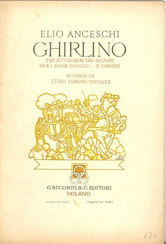 Copertina del libretto d'opera "Ghirlino" di Elio Anceschi musica di Luigi Ferrari Trecate - edizioni G. Ricordi & C. Milano